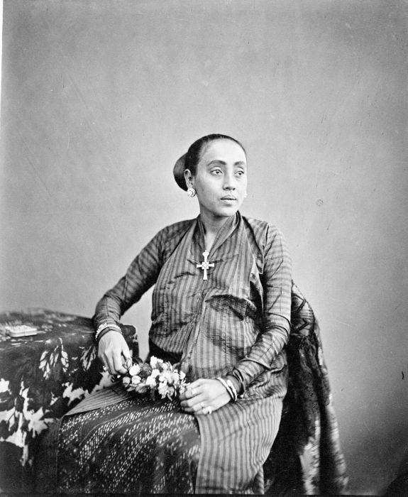 Foto. Een Raden Ajoe, een adellijke dame, uit Madoera.